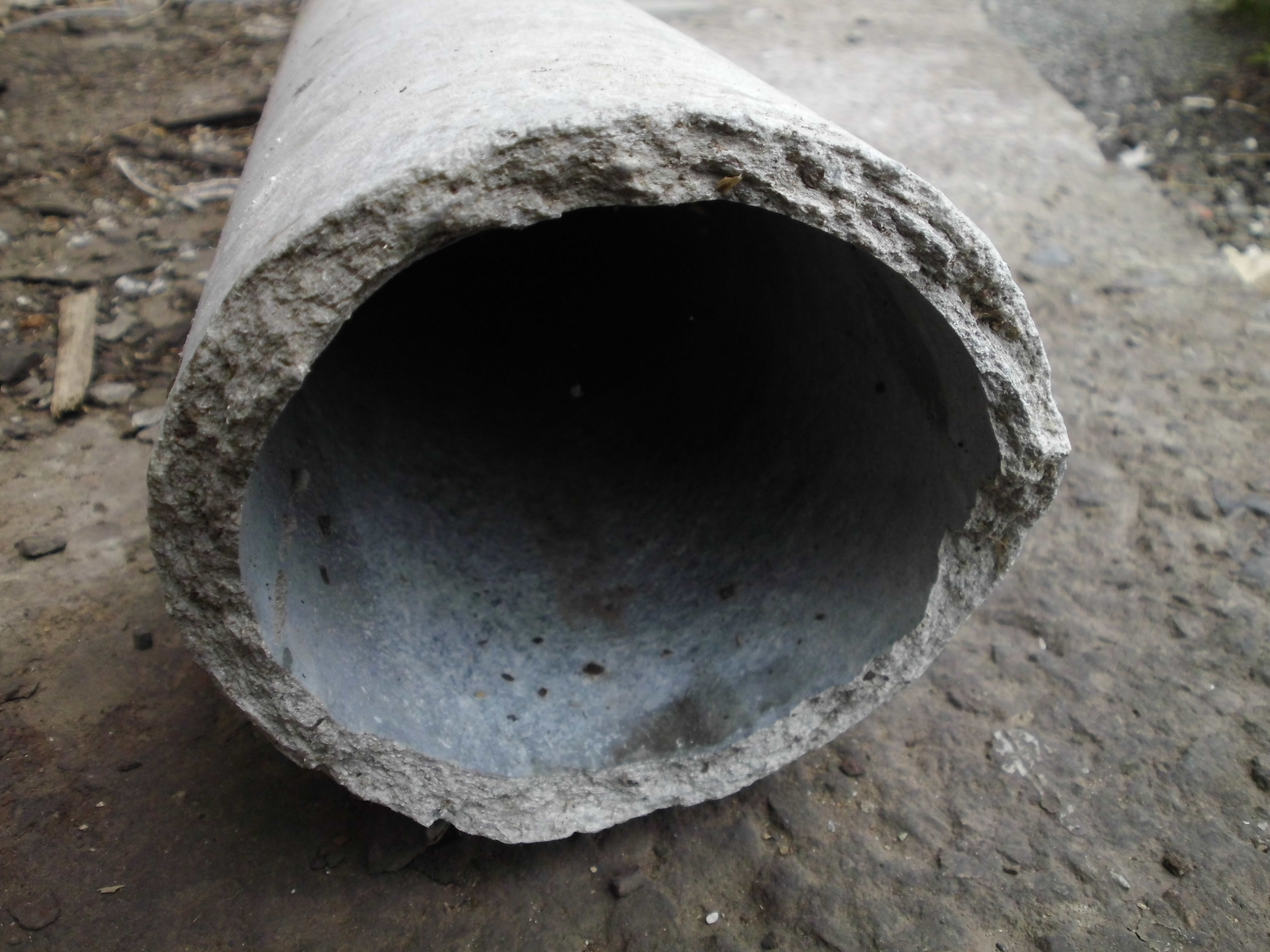 Кусок асбестоцементной трубы. Место излома, видны включения асбестовых волокон